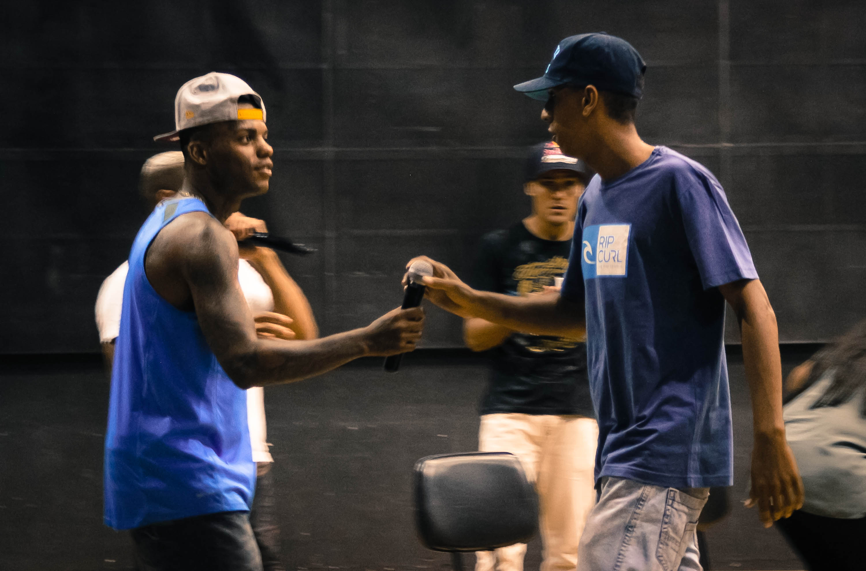 Reunião da liga do funk @ Galeria Olido - SP (CC by SA) Fora Do Eixo